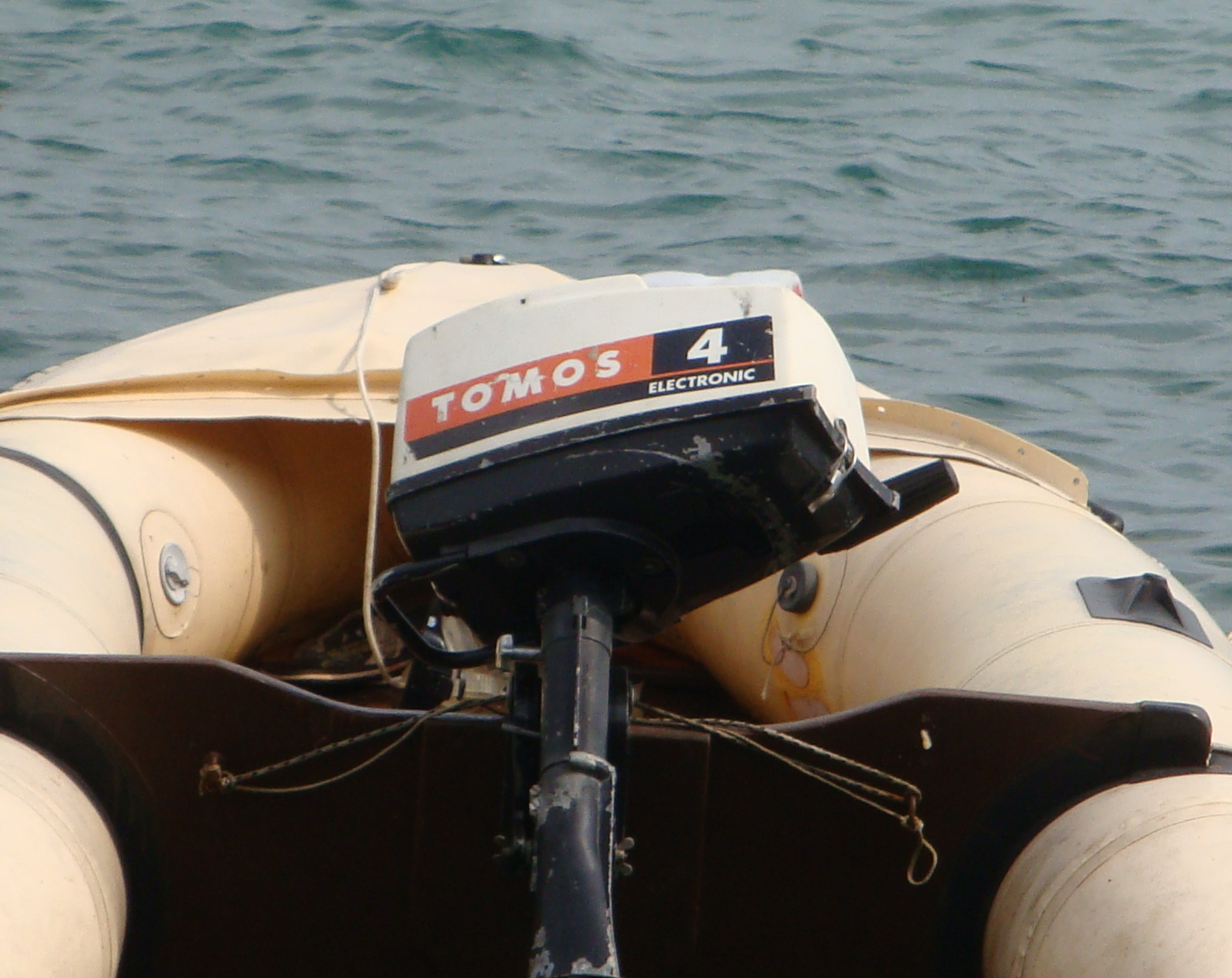 Tomosov motor na čolnu